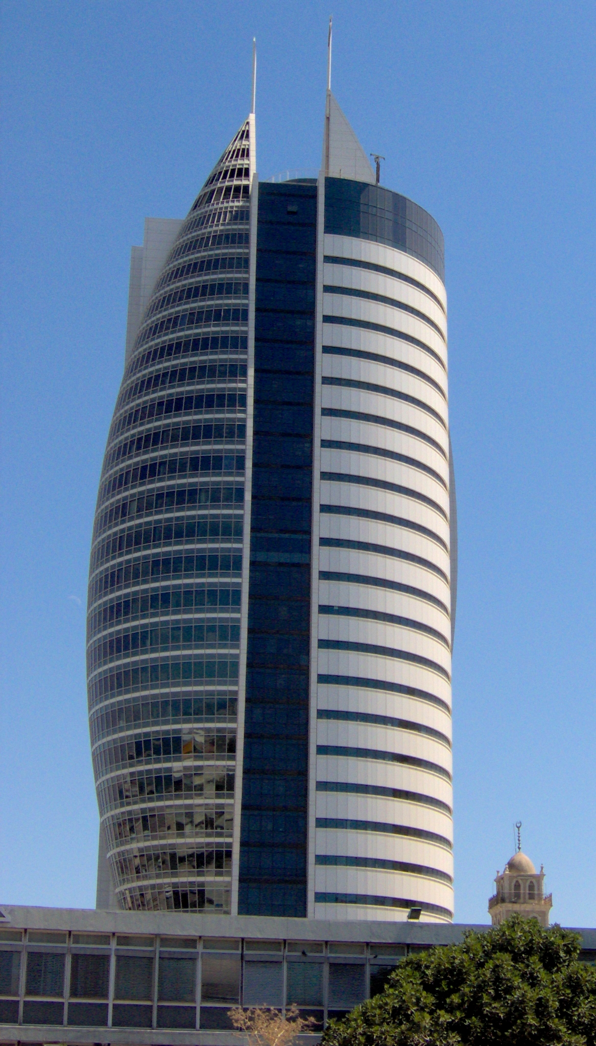 Sail Tower in Haifa, Israel.